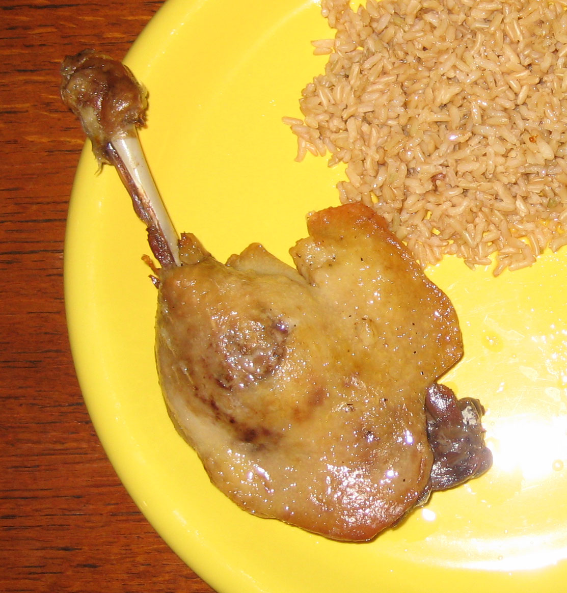 Confit de canard(duck leg confit)